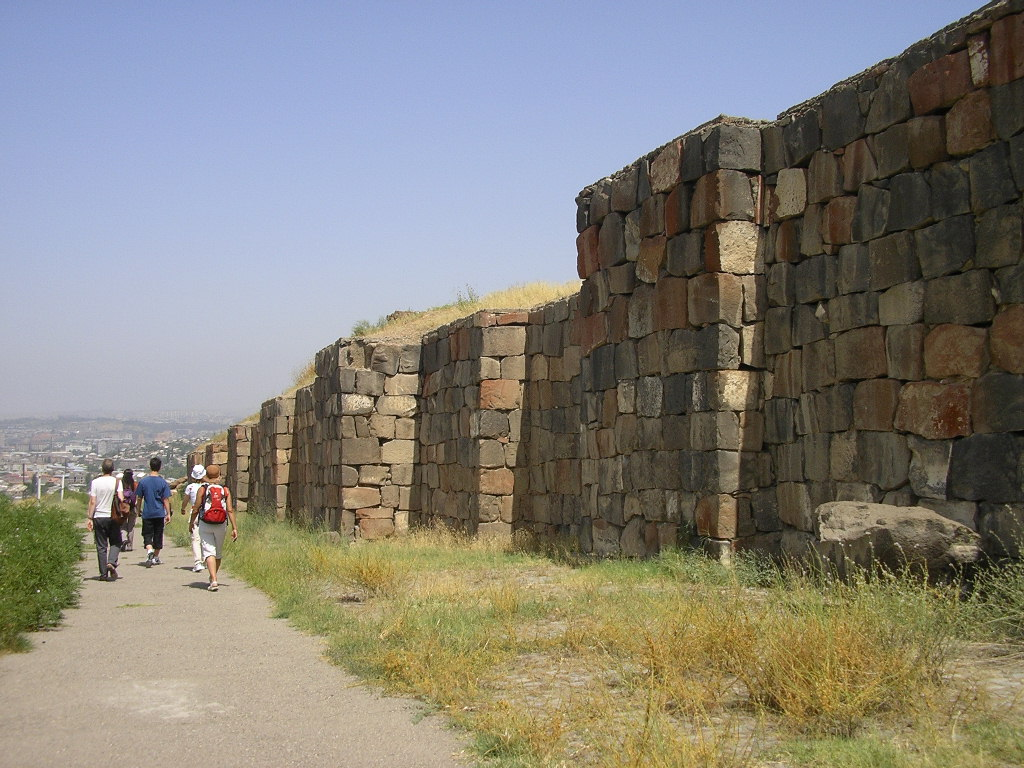 Erevan, la forteresse d'Erébouni